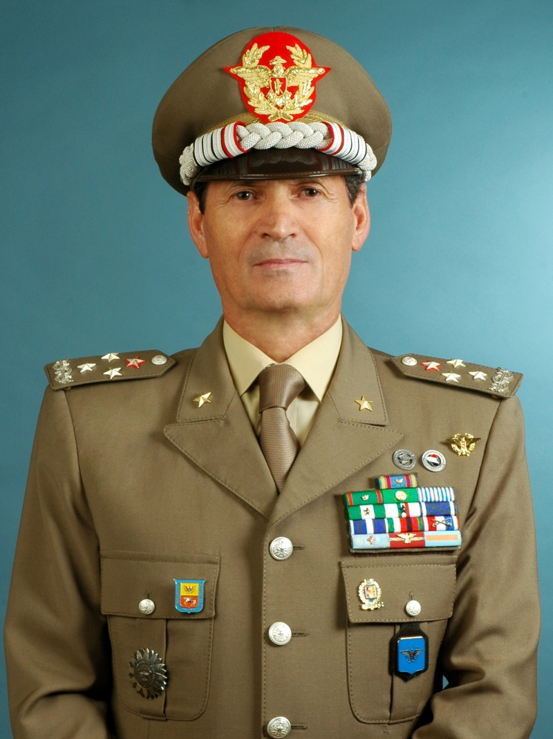 Filiberto Cecchi Licenza L'Utente:Sasadoku ha ottenuto l'autorizzazione dal Sito Ufficiale dell'Esercito Italiano all'utilizzo di tutto il materiale pubblicato on line (testo e/o immagini) sul sito stesso, a condizione che ne venga citata la fonte. L'immagine è stata scaricata da uno dei siti da cui wikipedia ha ottenuto l'autorizzazione Wikipedia:Autorizzazioni ottenute dal Questo è il testo dell'autorizzazione ottenuta Wikipedia:Autorizzazioni ottenute/Esercito.